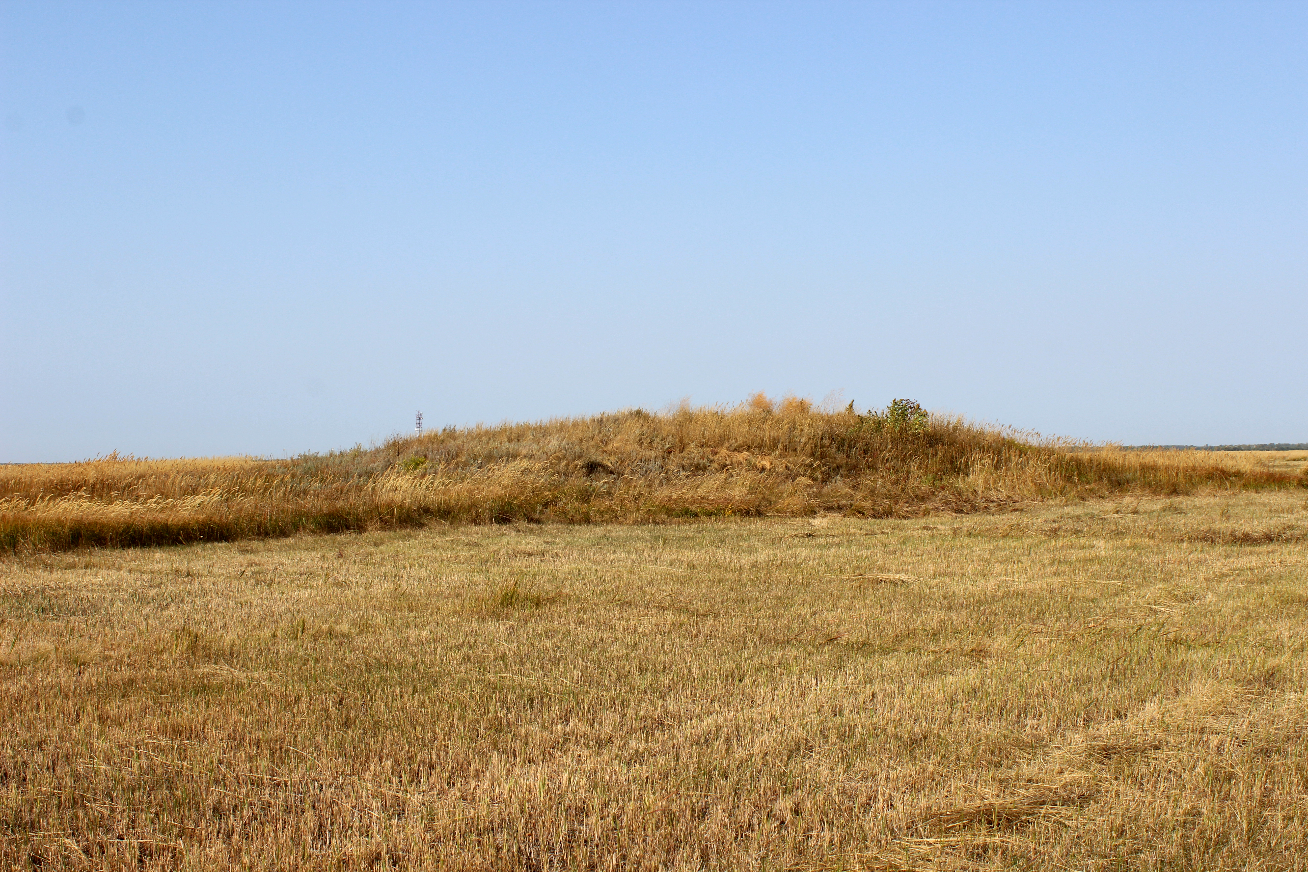 Курган "ТРЕХОЗЕРКА I", курган у деревни Озерной, 70 м юго-восточнее озера Камышкуль.